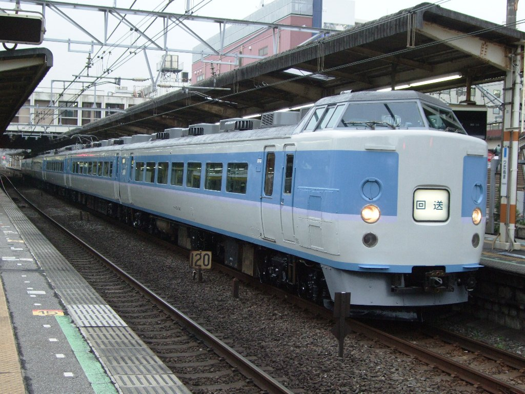 マリ32編成出場回送